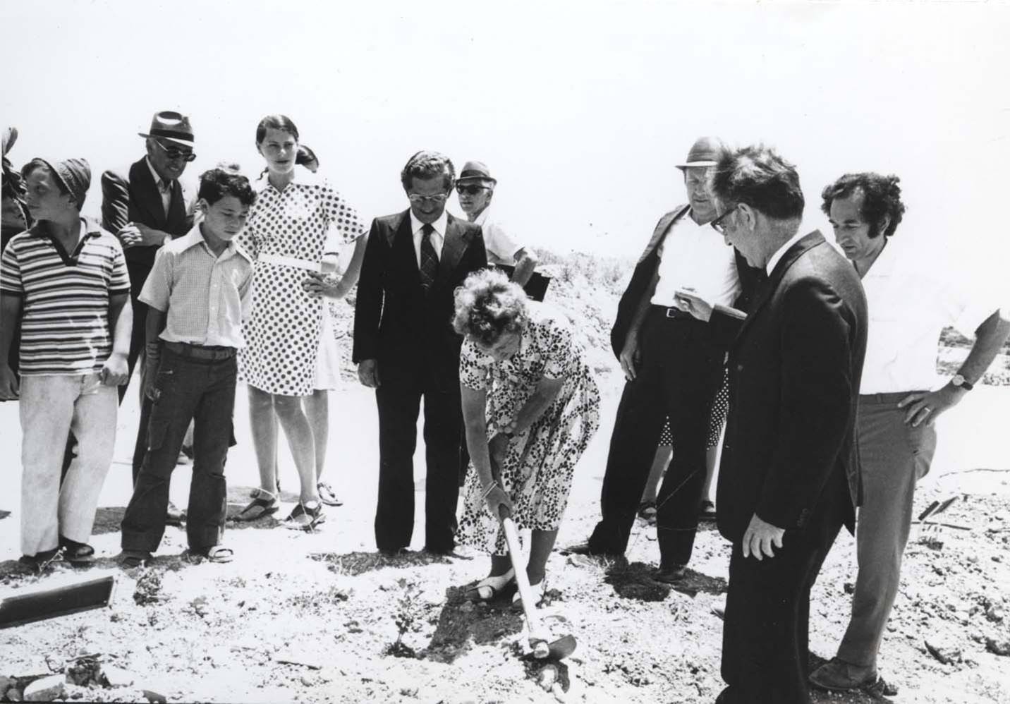 לידיה קטנאו לוקחת חלק בנטיעת עץ הכבוד וההנצחה בגן יד ושם לזכרה